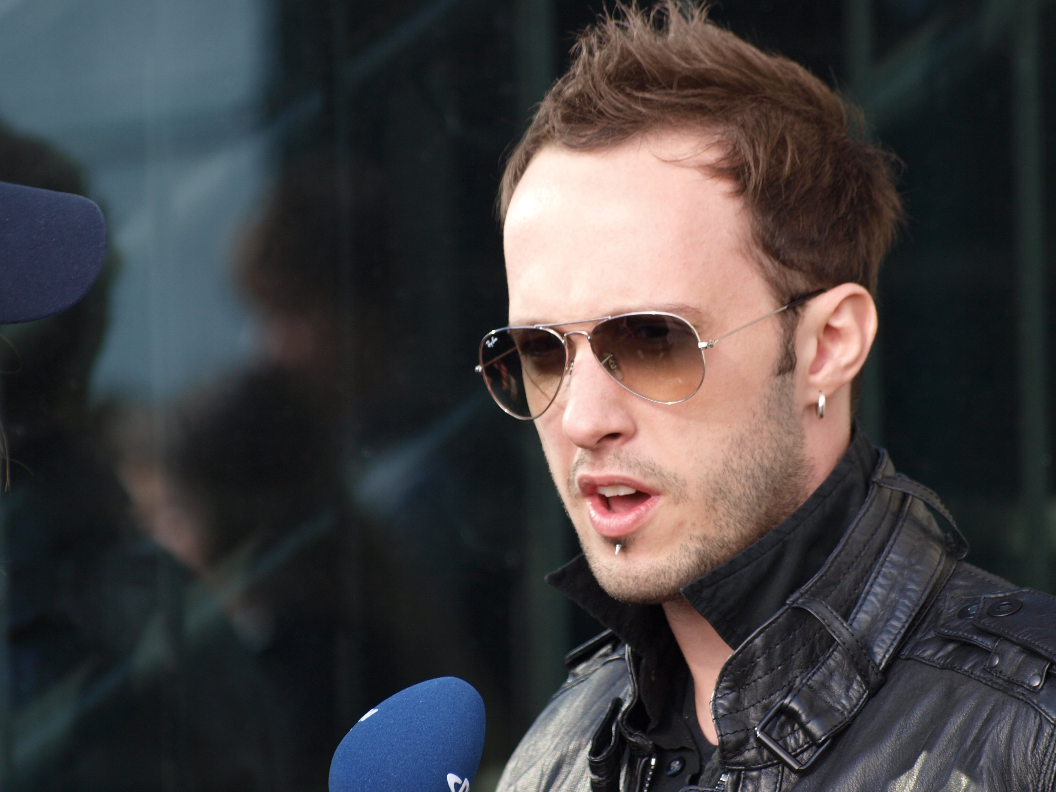 Vuka?in Braji?